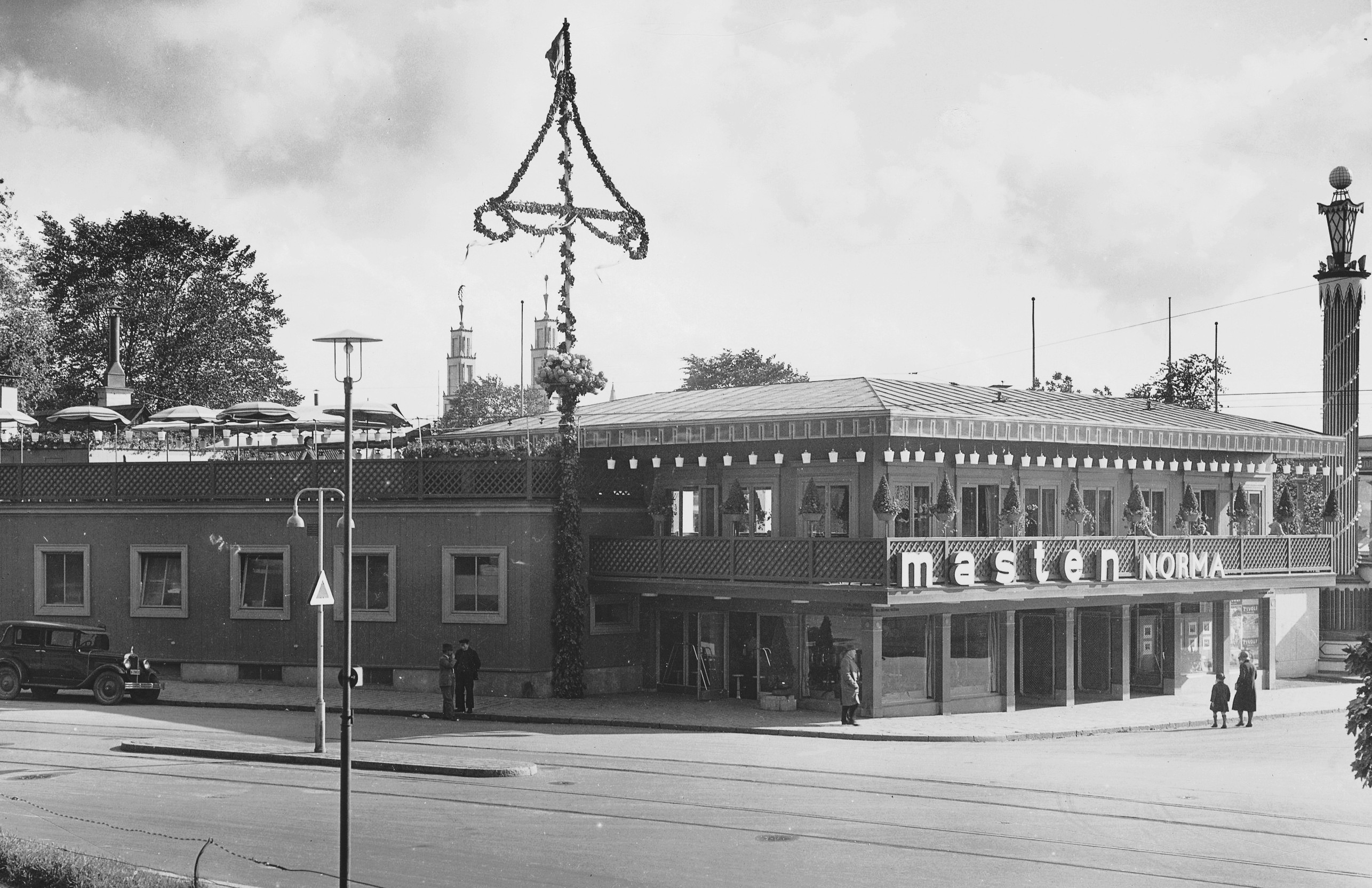 Restaurang "masten" (NORMA) i före detta kv Masten, Allmänna gränd / Djurgårdsvägen